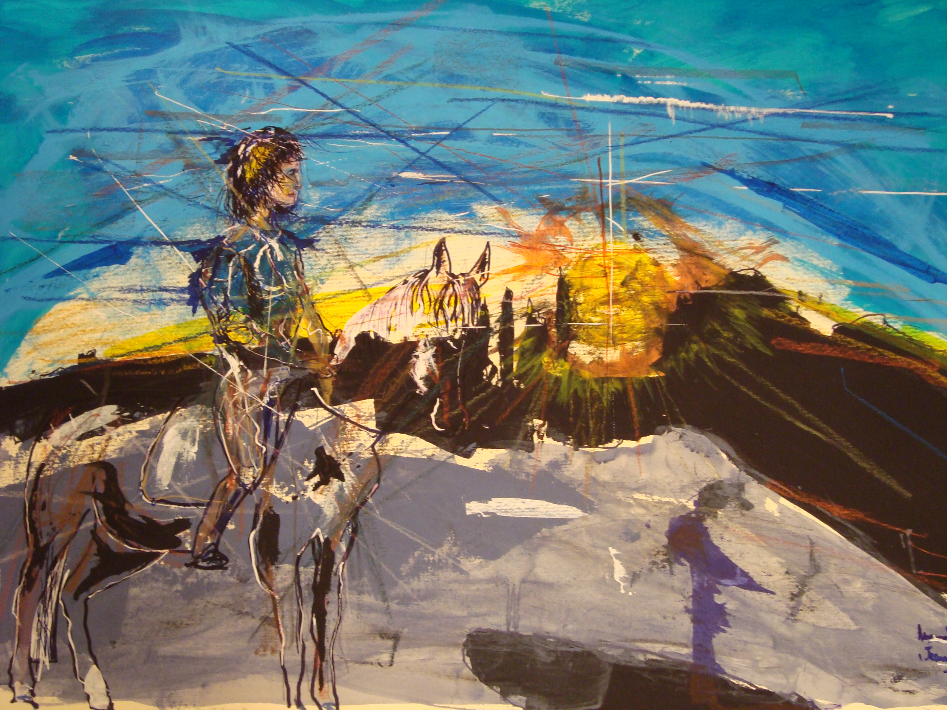 Jeanne d'Arc arrivant devant L'Île-Bouchard (2008, acrylique et pastel, 120 x 90 cm)